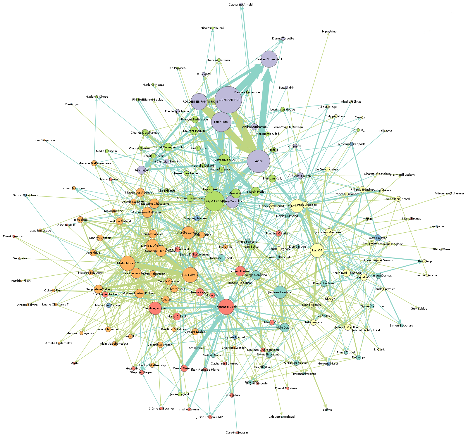 Graphe sociosémantique des interactions sur twitter autours du hashtag #TLMEP